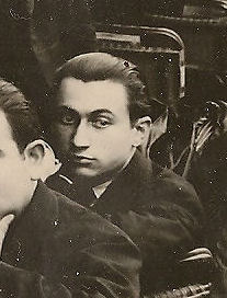 Julian Gorkin à Paris en 1925 (archives familiales)